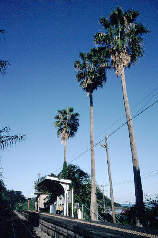 宮崎駅方向を撮影 撮影地：JR日南線小内海駅 撮影日：1998/10/2(金) カメラ：YASHICA FX-3 SUPER 2000 レンズ：CONTAX Distagon T* 25mm F2.8 フィルター：UV フィルム：コダクローム64